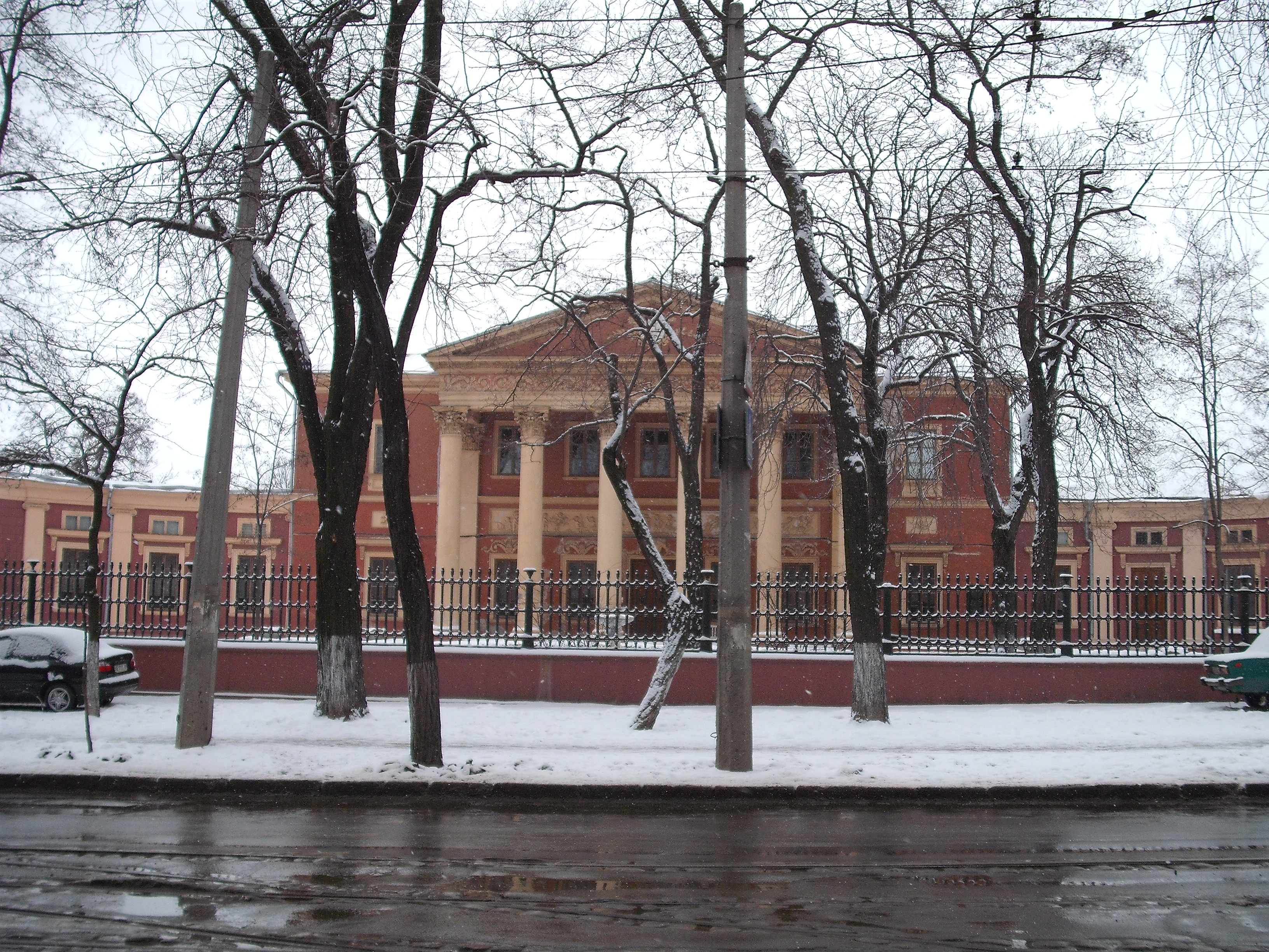 no original description